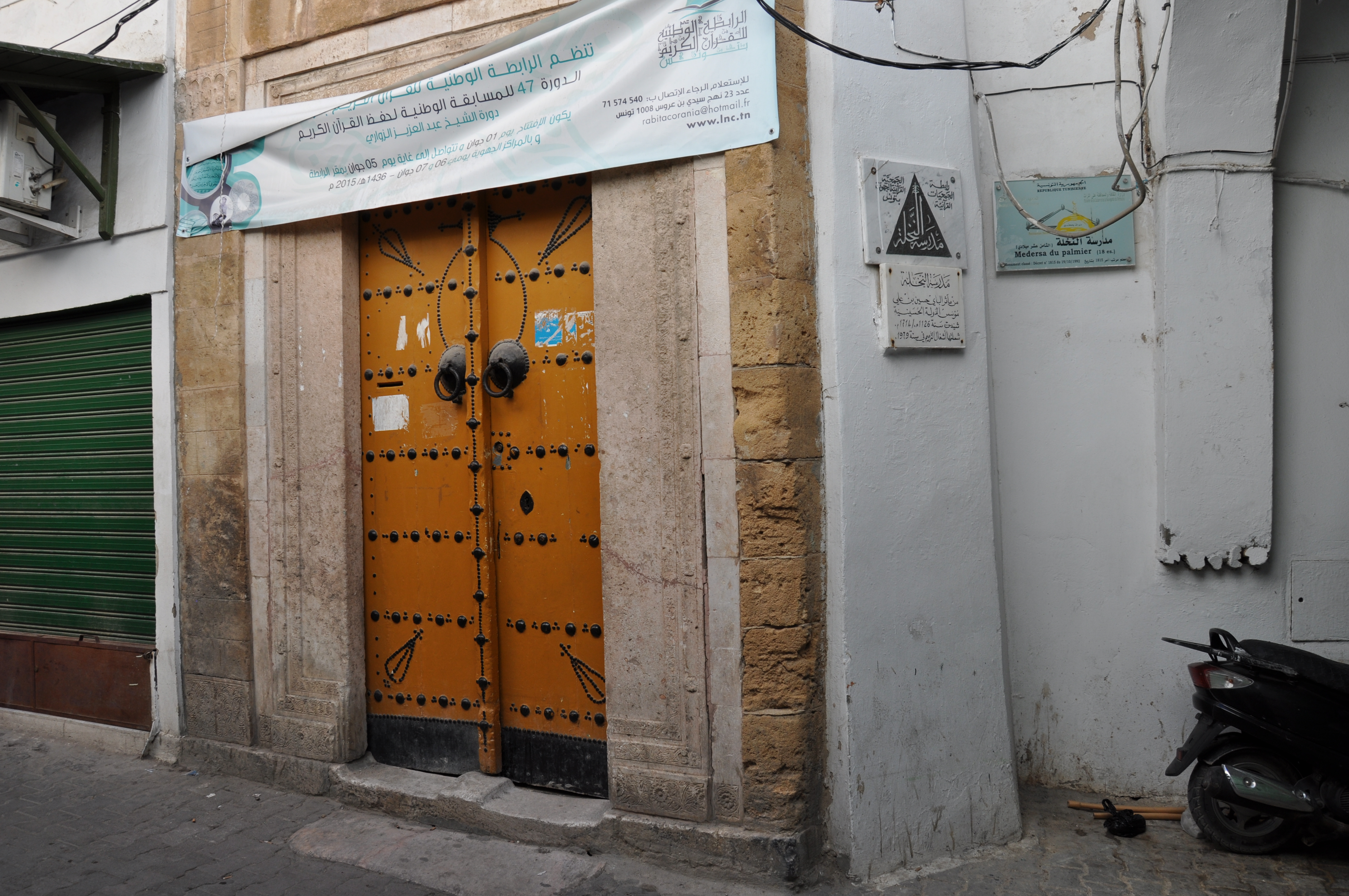 Medersa Ennakhla